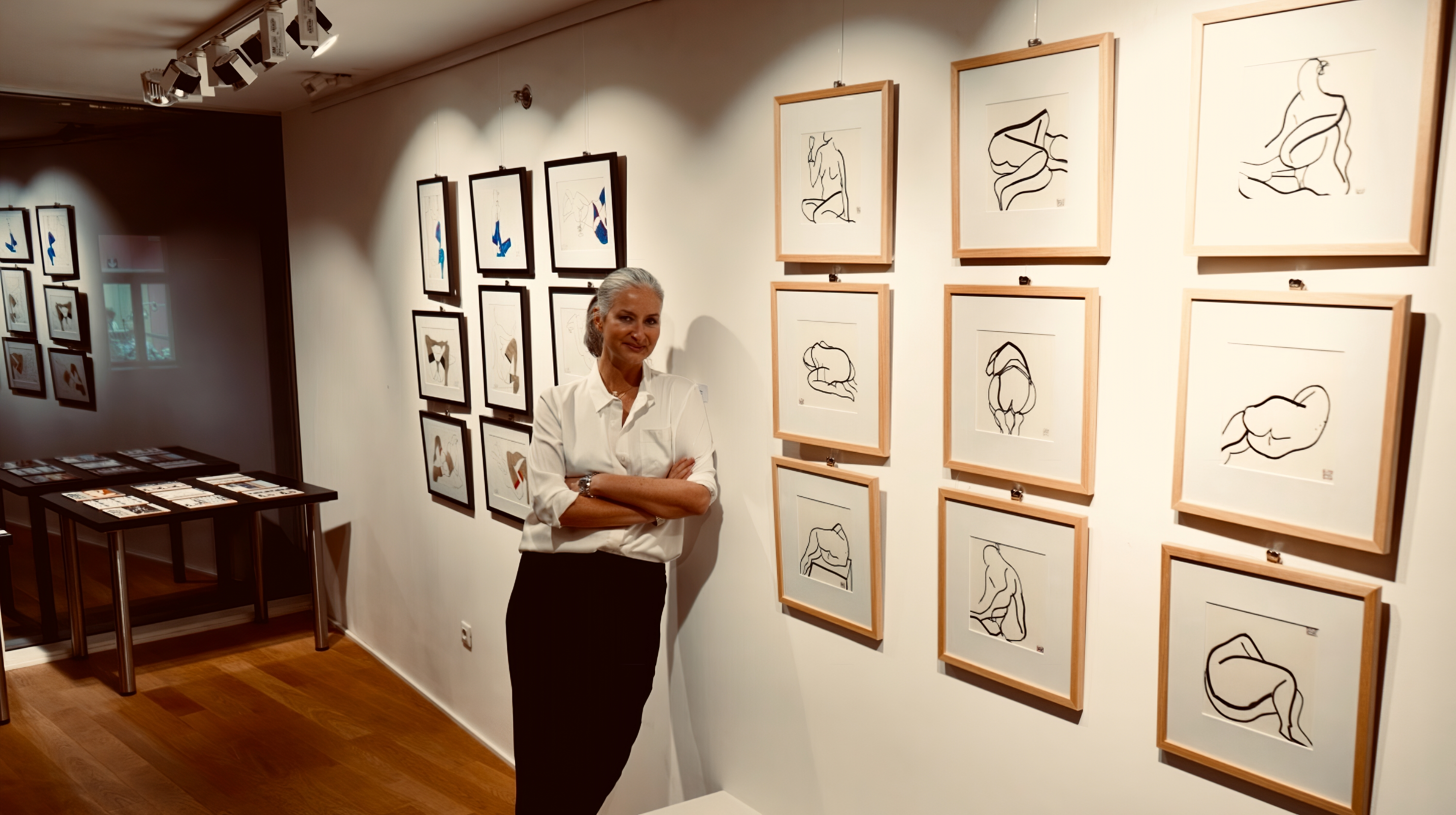 Petra M. Jelicic-Lovrekovic at the exhibition 2018